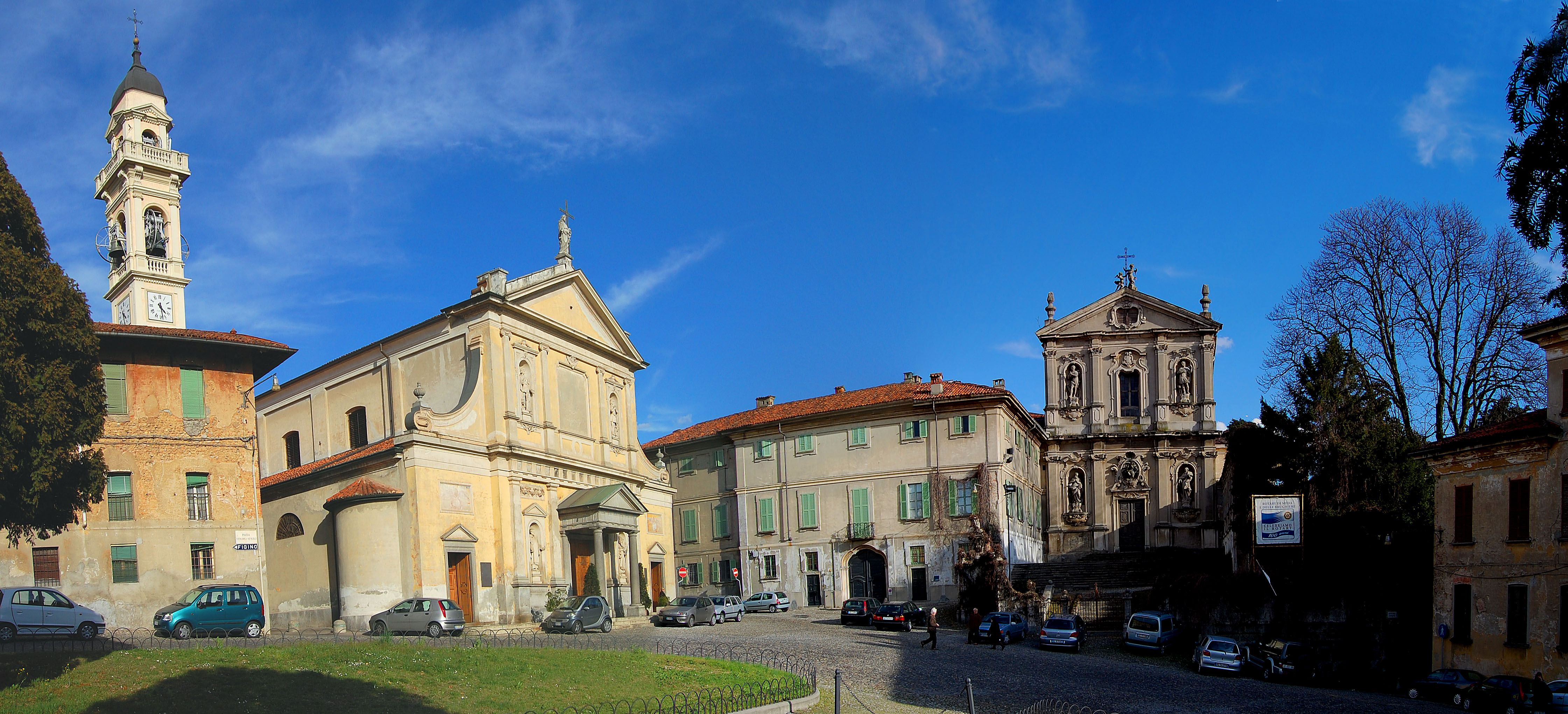 Meda (MB) 45.664746,9.155034. Panorama del monastero di S. Vittore e della piazza antistante. Brianza